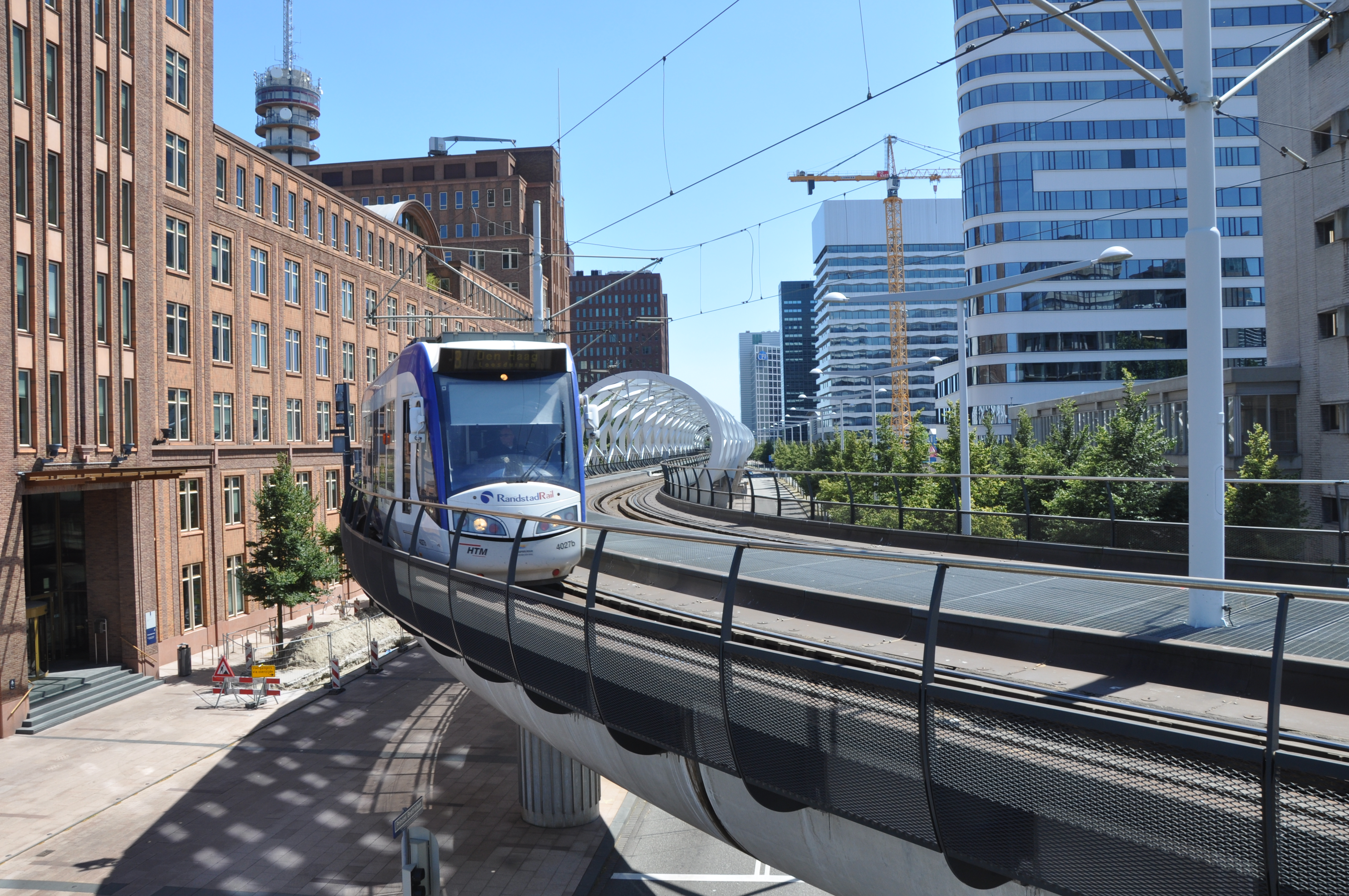 RandstadRail in de Prinses Beatrixlaan, Den Haag, 2018